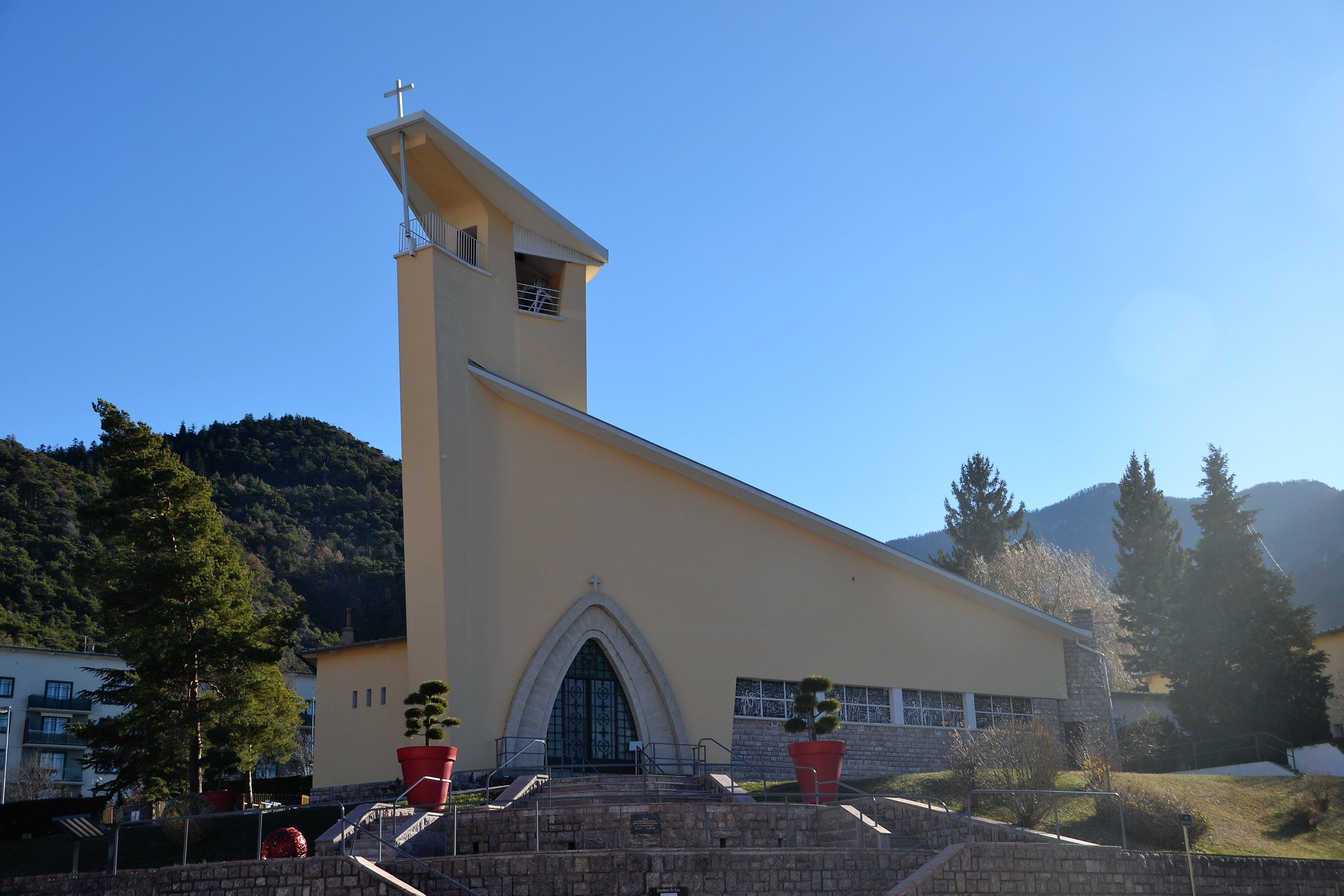 L'église de Savines-le-Lac (Hautes-Alpes). Vue extérieure.